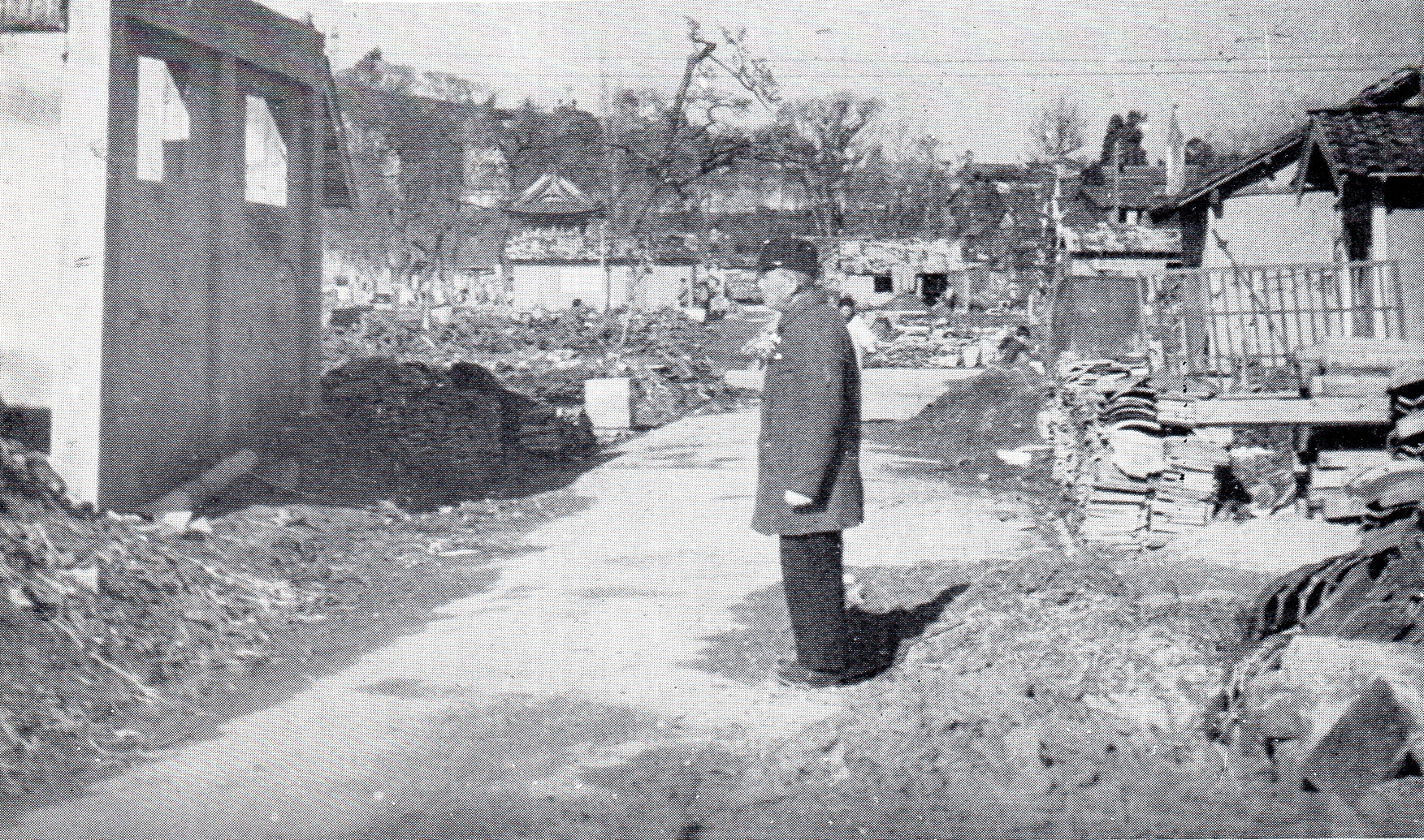 岡崎空襲後、市街地を視察する菅野経三郎市長